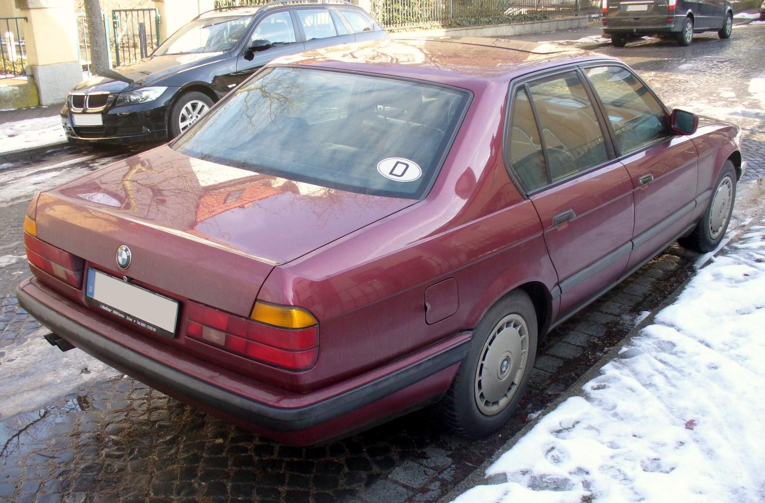 BMW E32